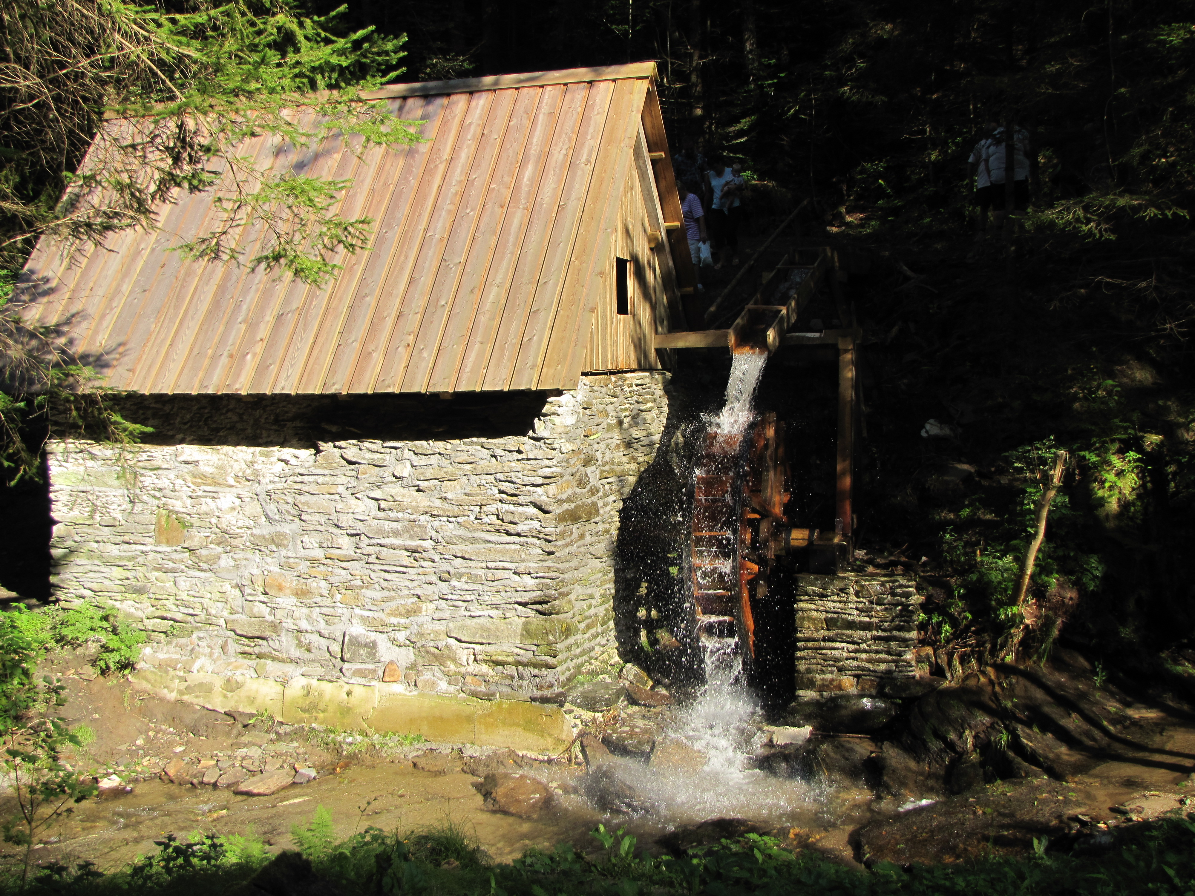 Šetorov mlin na vodni pogon v Bojtinskem potoku. Obnovljen 2010